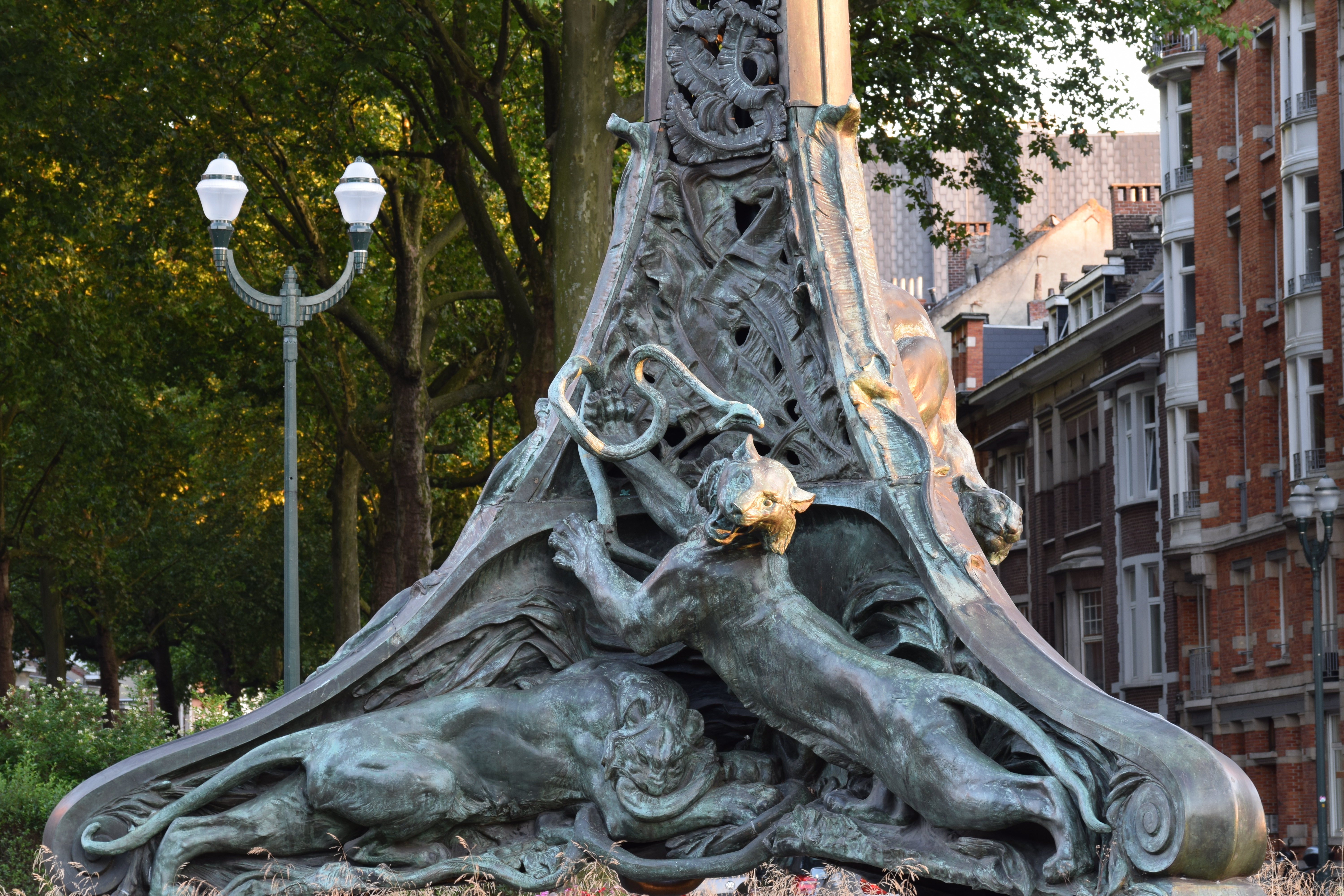 Detail lichtmast Lalaing (Schaarbeek/België)